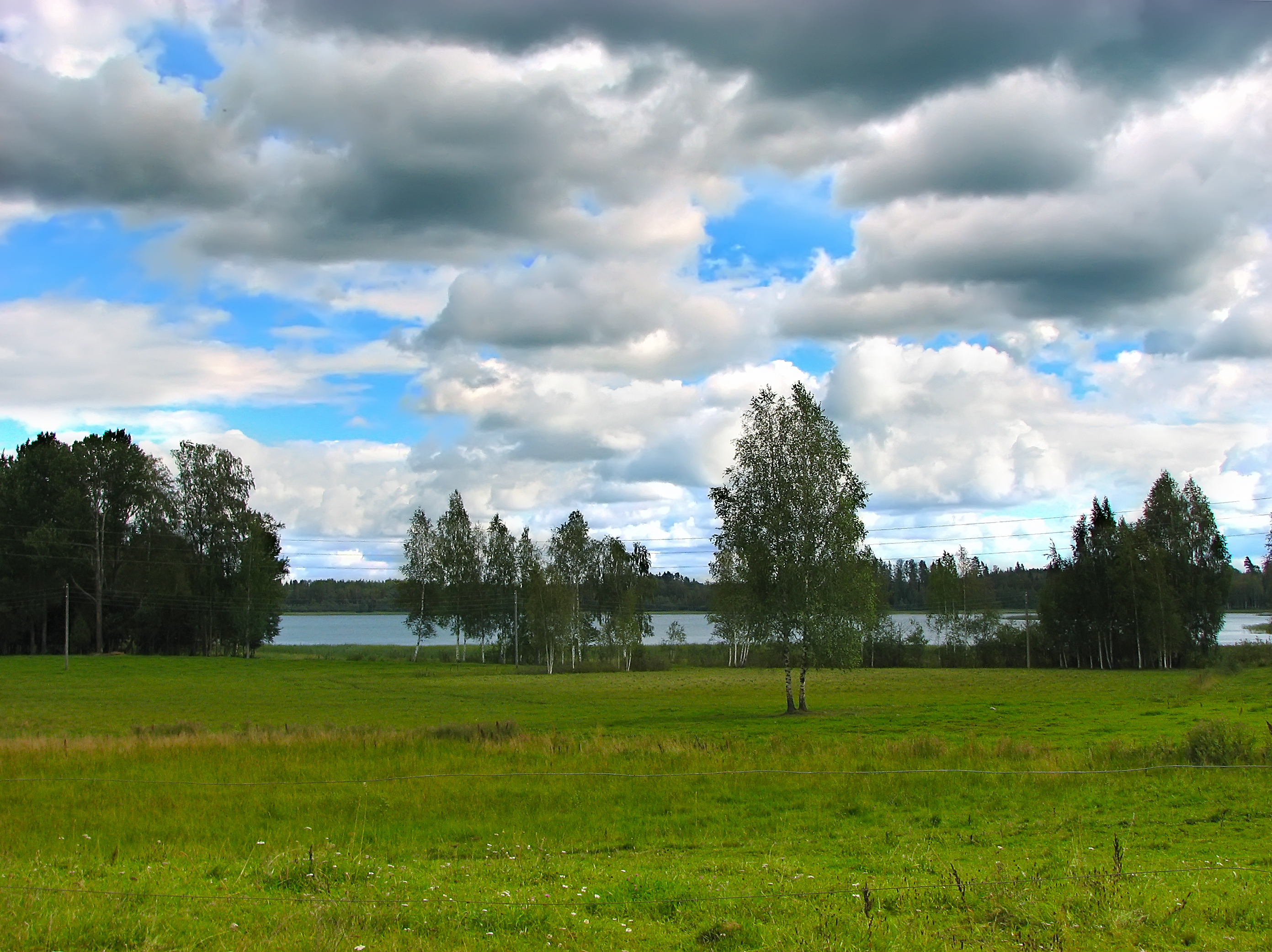 озеро Недзис